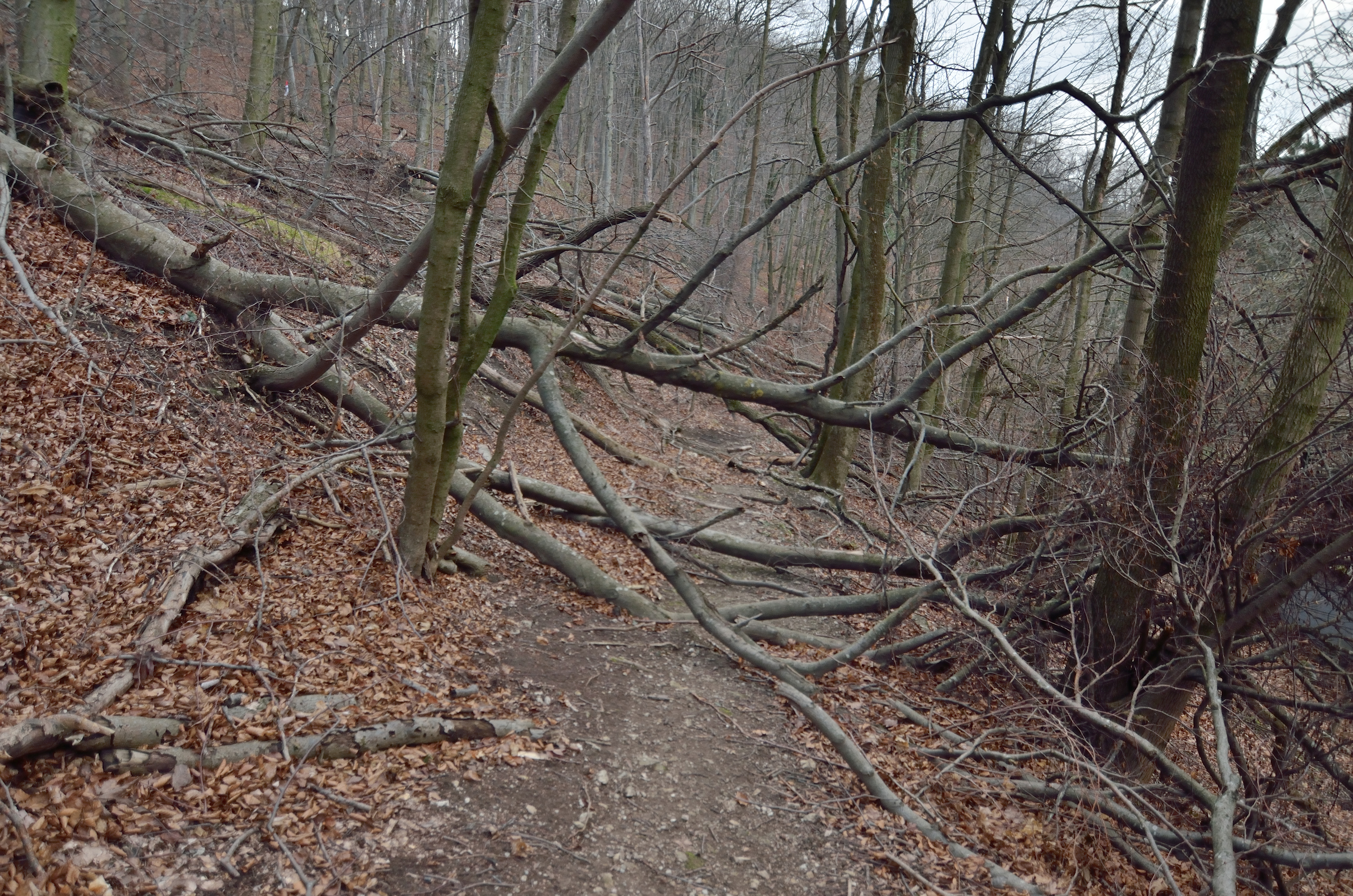 Der Waldweg hinter (südlich) des Zementwerks Rodaun mit durch Windbruch querliegenden Bäumen.